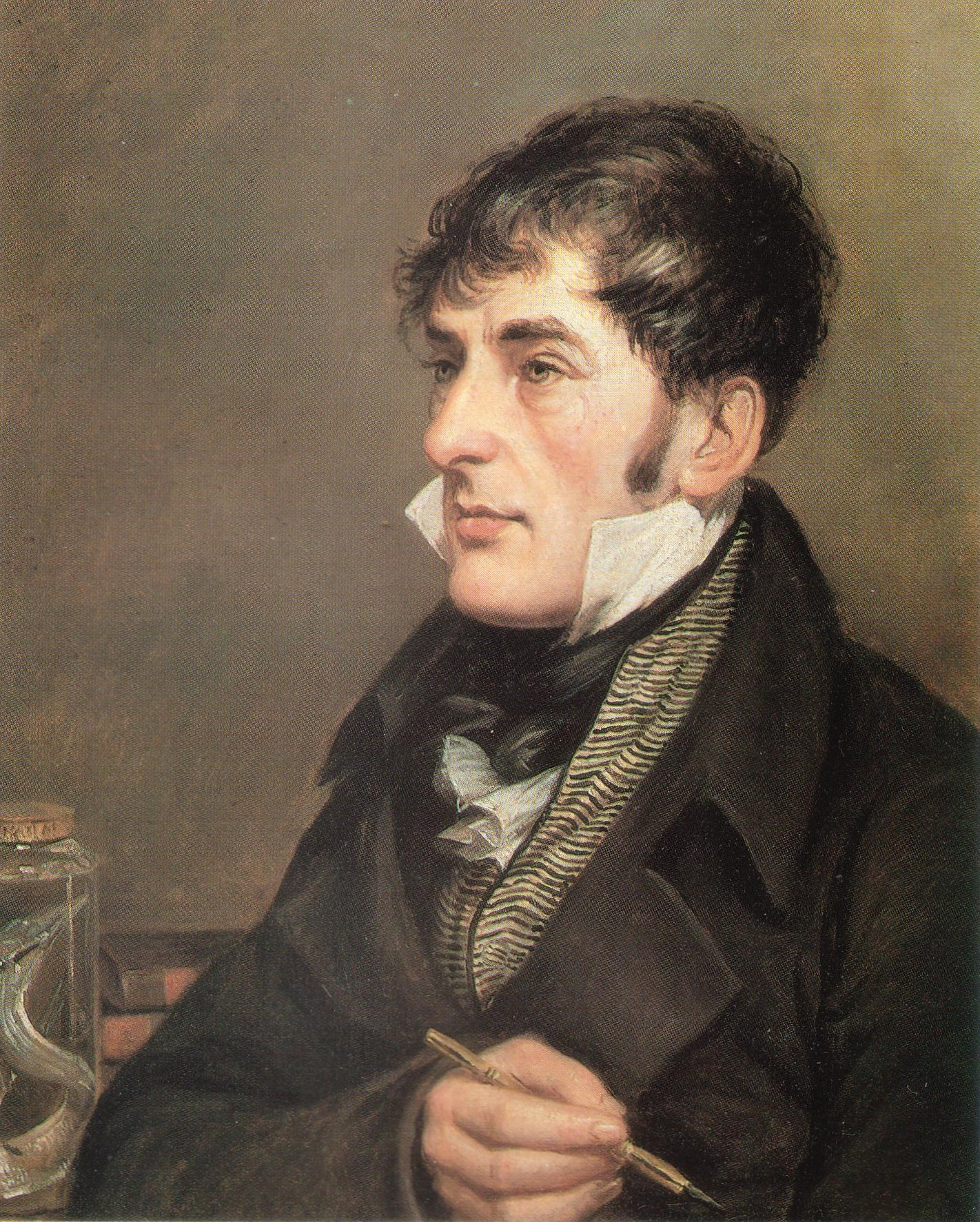 Portrait of Charles-Alexandre Lesueur (1778-1846)